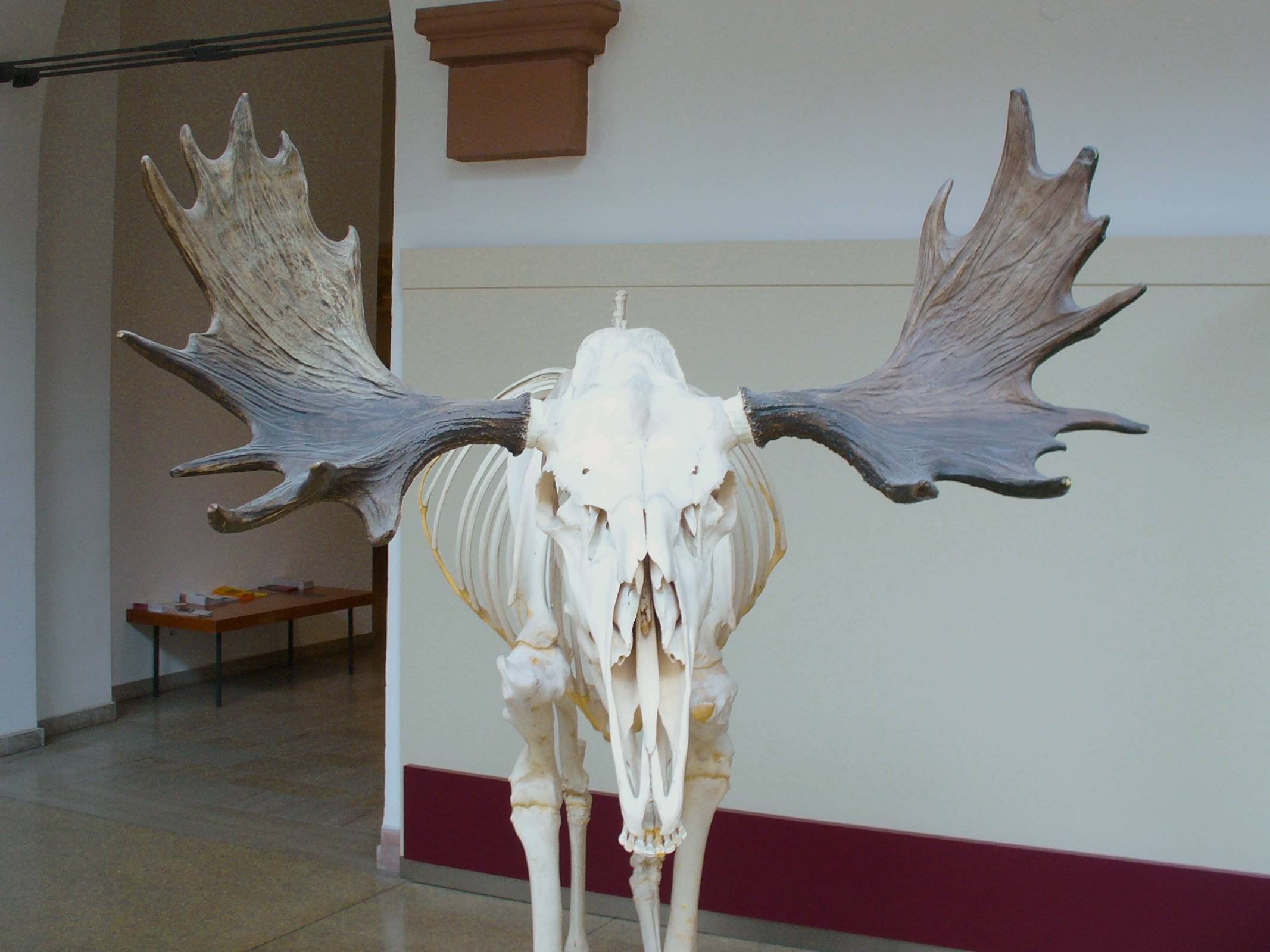 Moose skeleton (Alces alces)